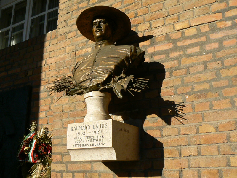 Kálmány Lajos születésének 150. évfordulója alkalmából avatták föl, Móra Ferenc kezdeményezése csaknem nyolc évtized után vált valóra. Népköltészeti gyűjtésünk klasszikusát mintázta meg az alkotó, mögötte búzakéve. A Nemzeti Emlékcsarnokba, a nagy utód Bálint Sándor szobra mellett helyezték el.